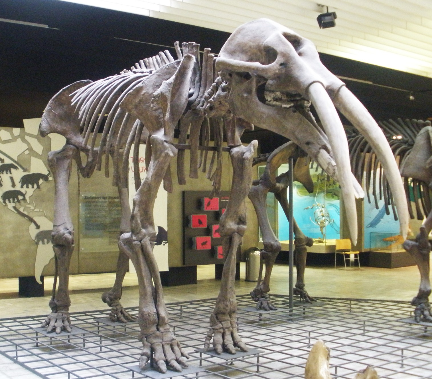 Fossil of Gomphotherium, an extinct proboscidean- Took the photo at Senckenberg Museum of Frankfurt